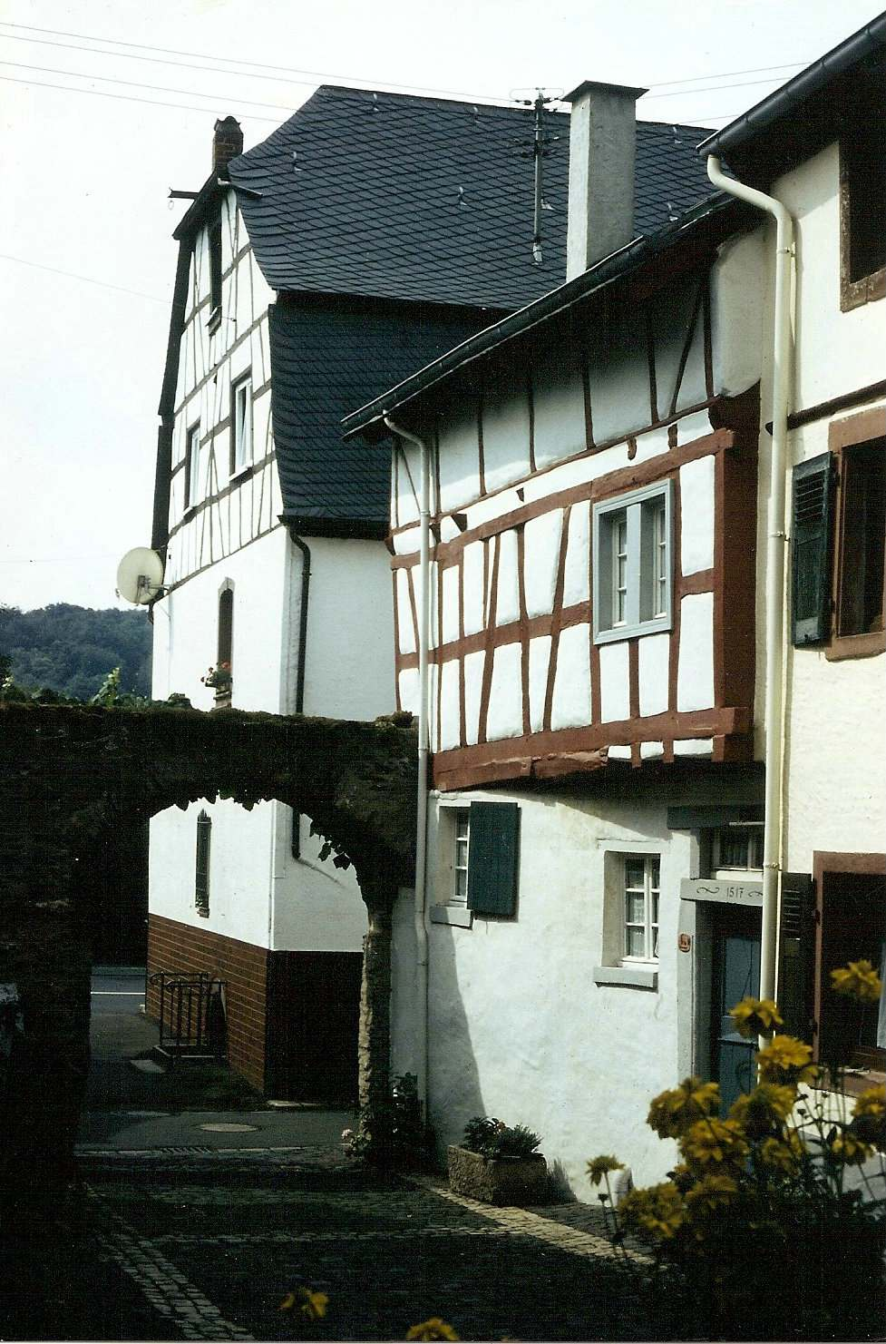 Ältestes Haus am Posthof, Fährhaus und vermutlich erstes Posthaus